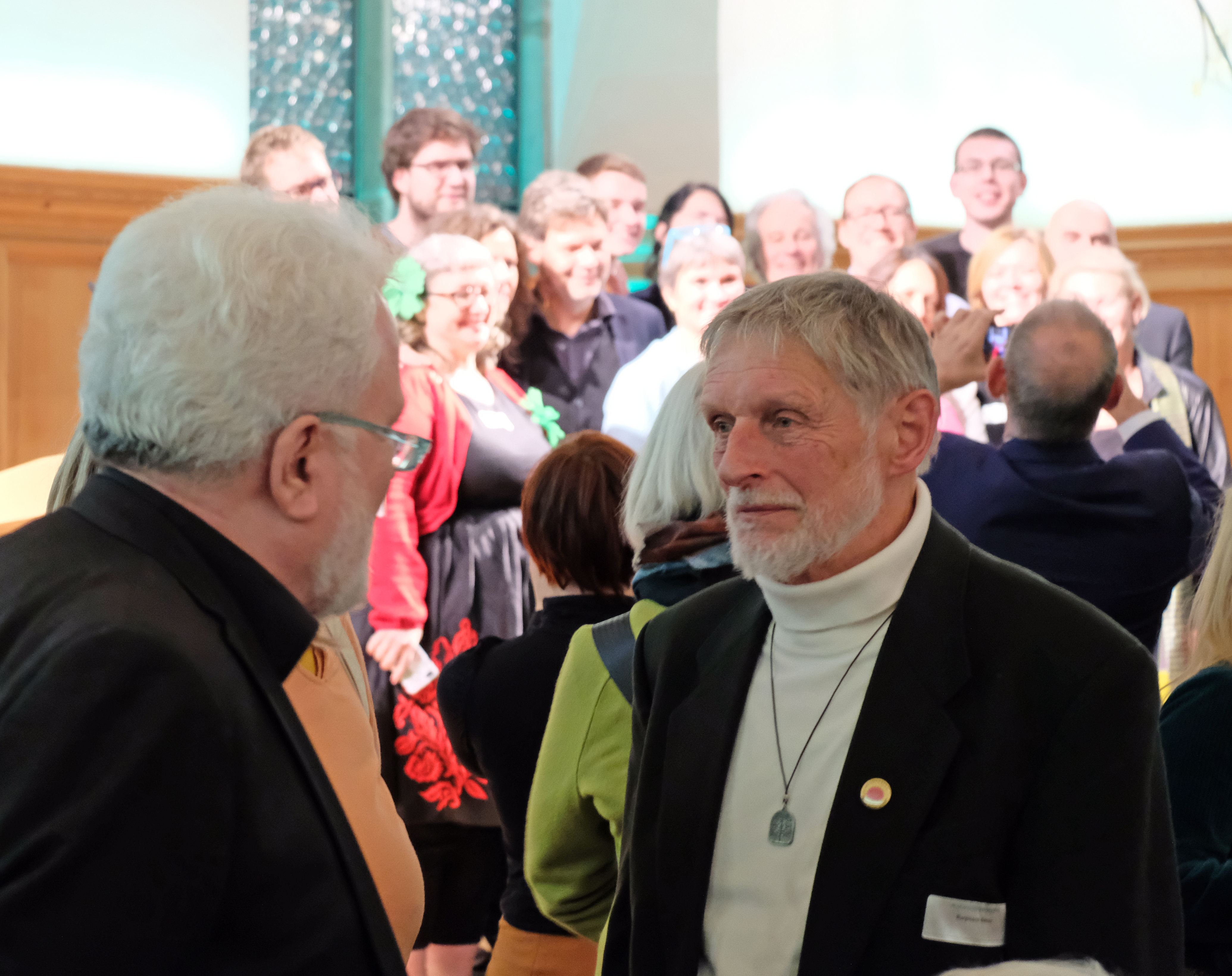 Dieter Burgmann, ehem. MdB Die Grünen, Nov. 2019